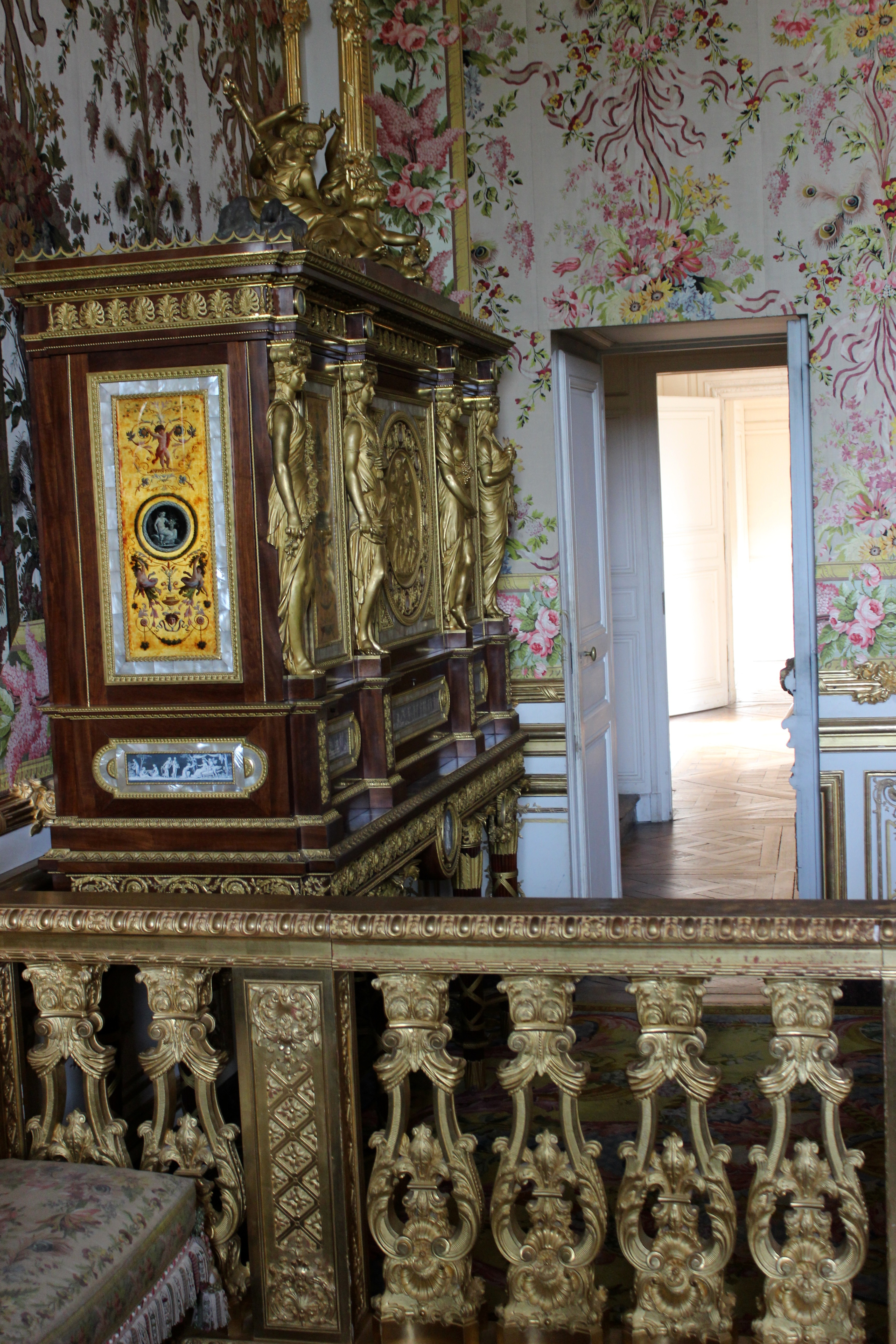 Château de Versailles, Chambre de la reine. .